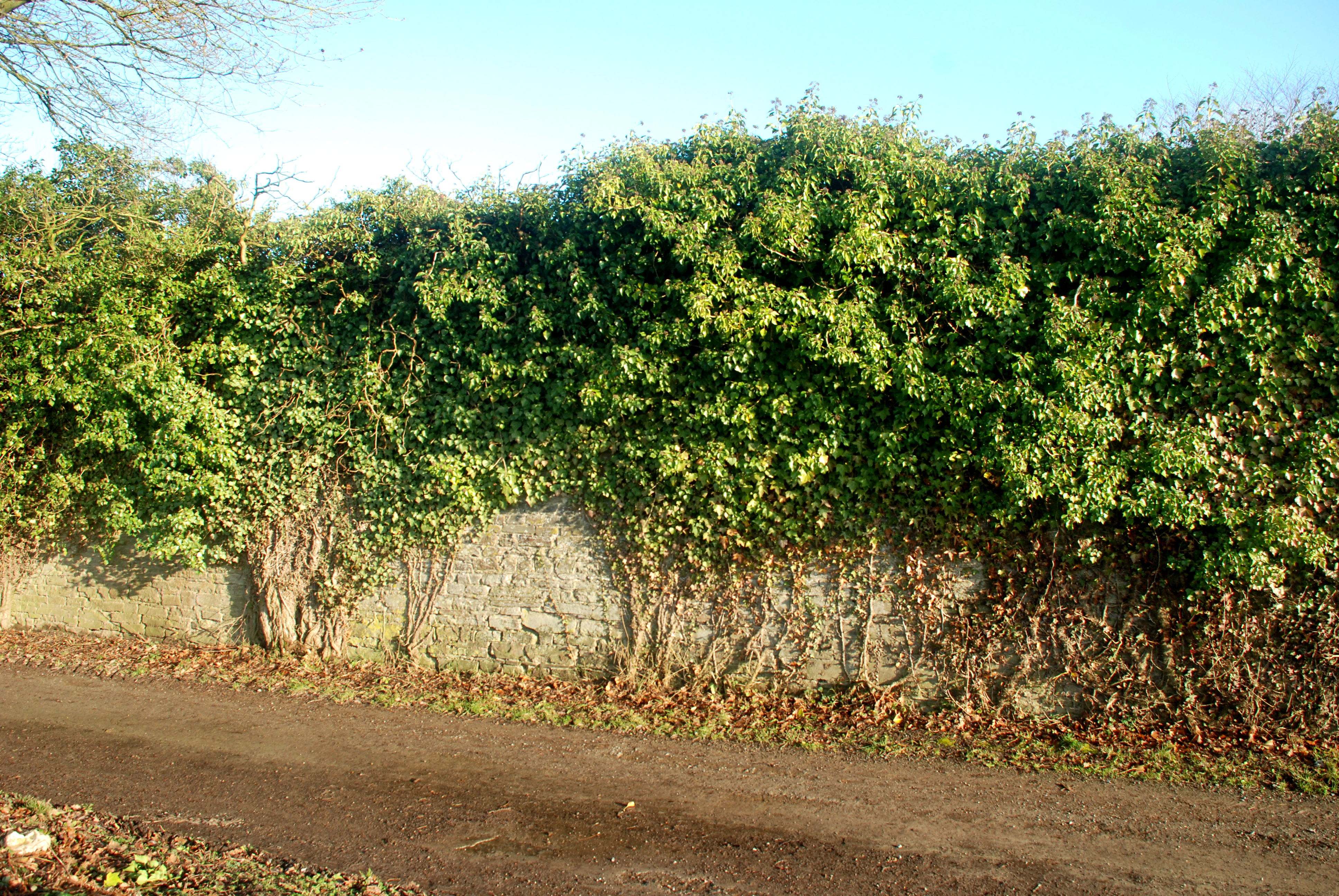 Belgique - Brabant wallon - Mur d'enceinte de l'abbaye de Villers-la-Ville